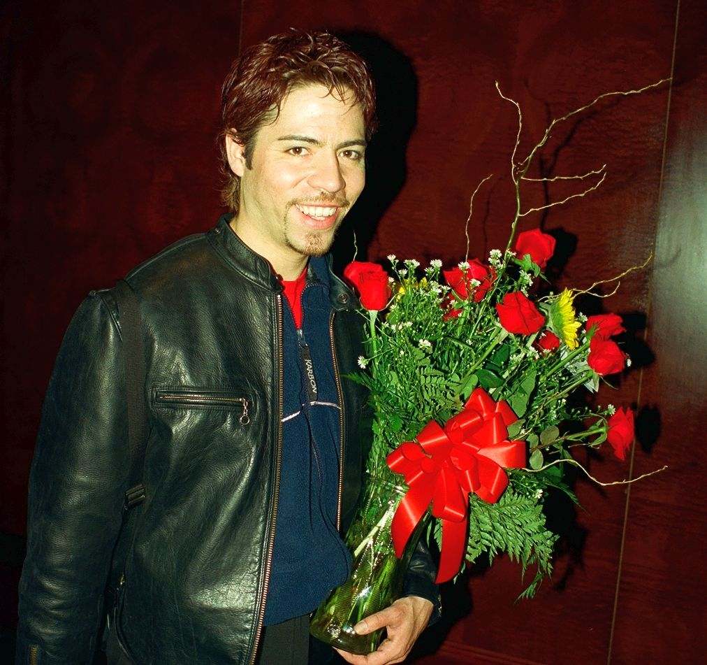 April 6, 2000 Baltimore M.D.